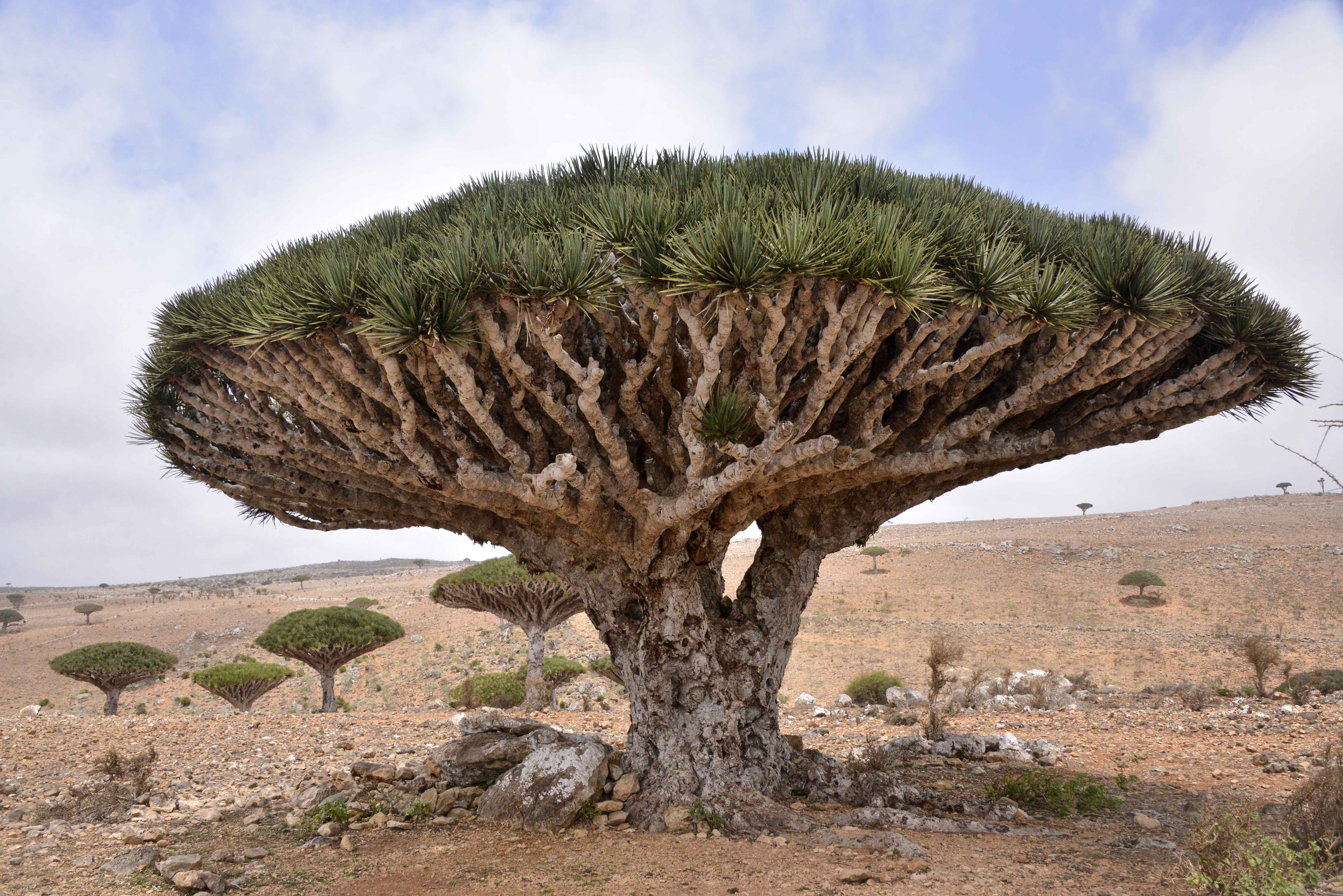 5000 y.old